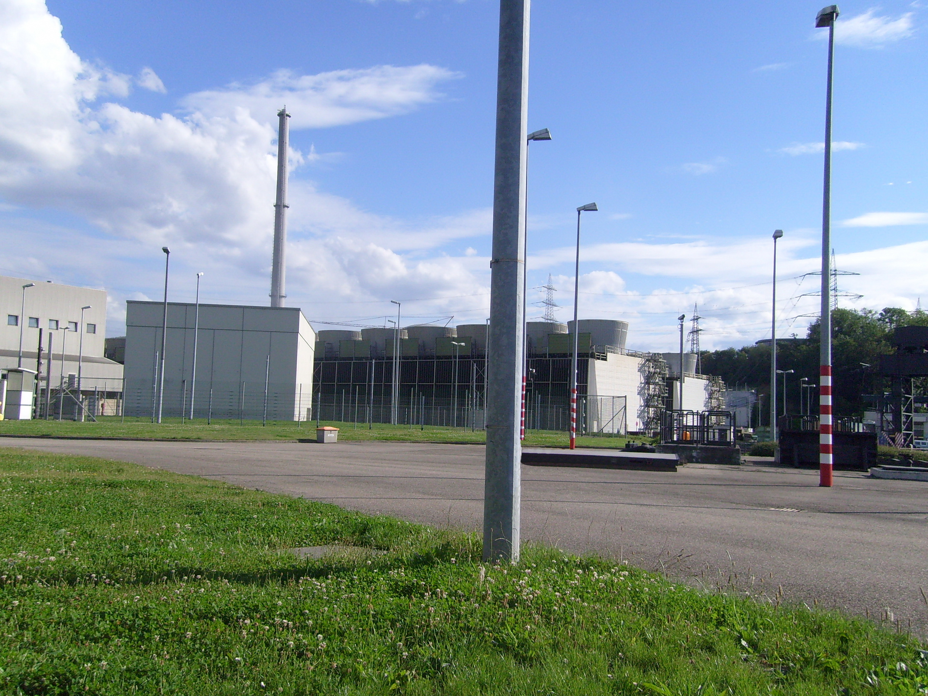 Zellenkühler des ersten Blocks und Abluftkamin im Kernkraftwerk Neckarwestheim